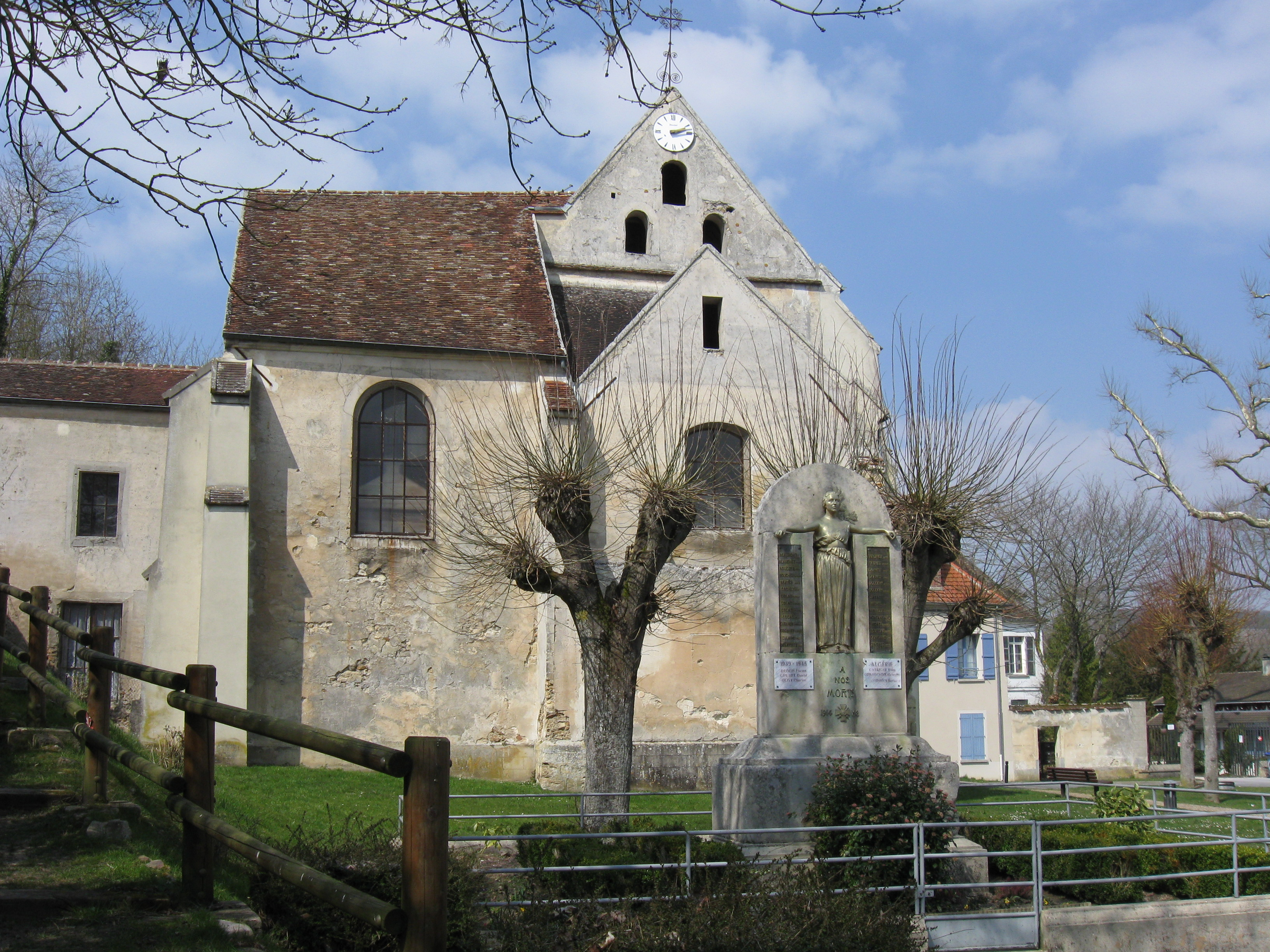 Église Saint-Pons et monument aux morts de Citry. (Seine-et-Marne, région Île-de-France).